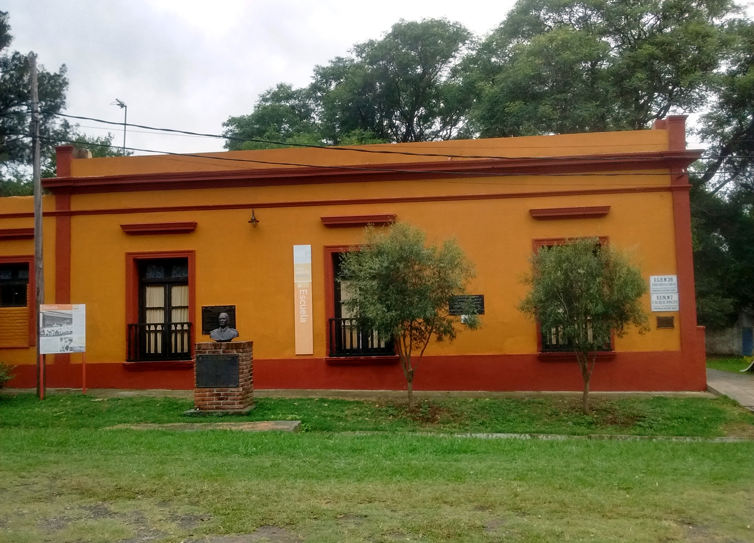 EGB 39 Juan Diaz de Solís y EEM 7 Cacique Pincén, en la Isla Martín García. En ella estuvo preso el entonces Coronel Juan Domingo Perón entre el 13 y 17 de octubre de 1945.